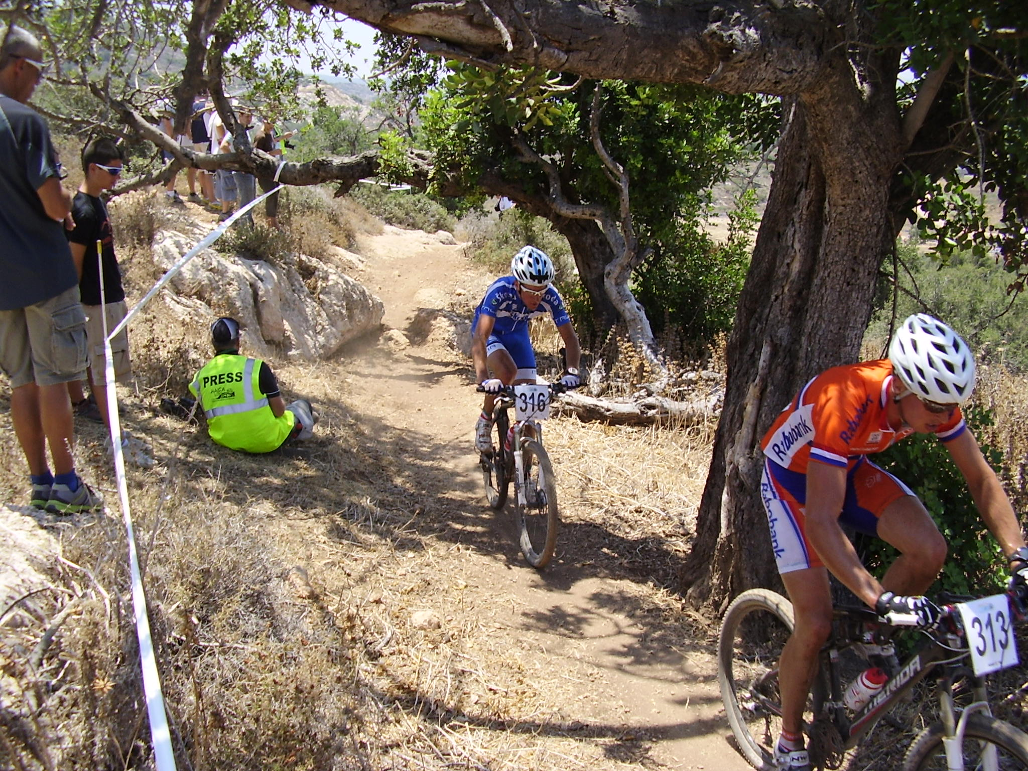 U23 men race, European championship XCO 2010, Haifa, Israel